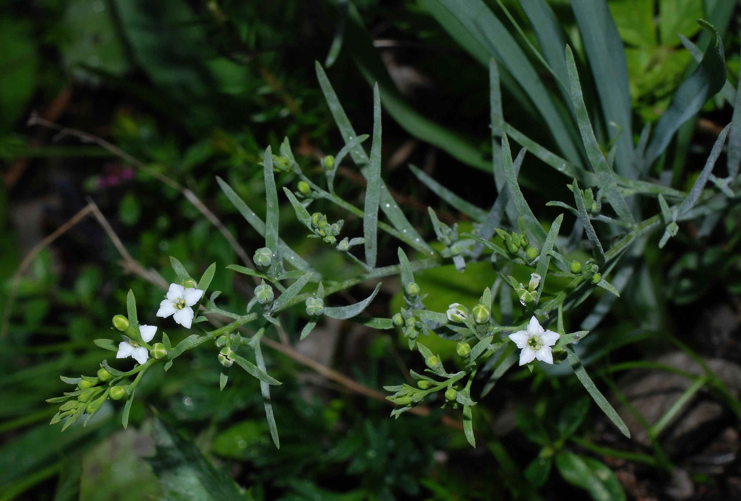 Thesium alpinum, near Hintersteineralm ~1300 m, Upper Austria, Austria